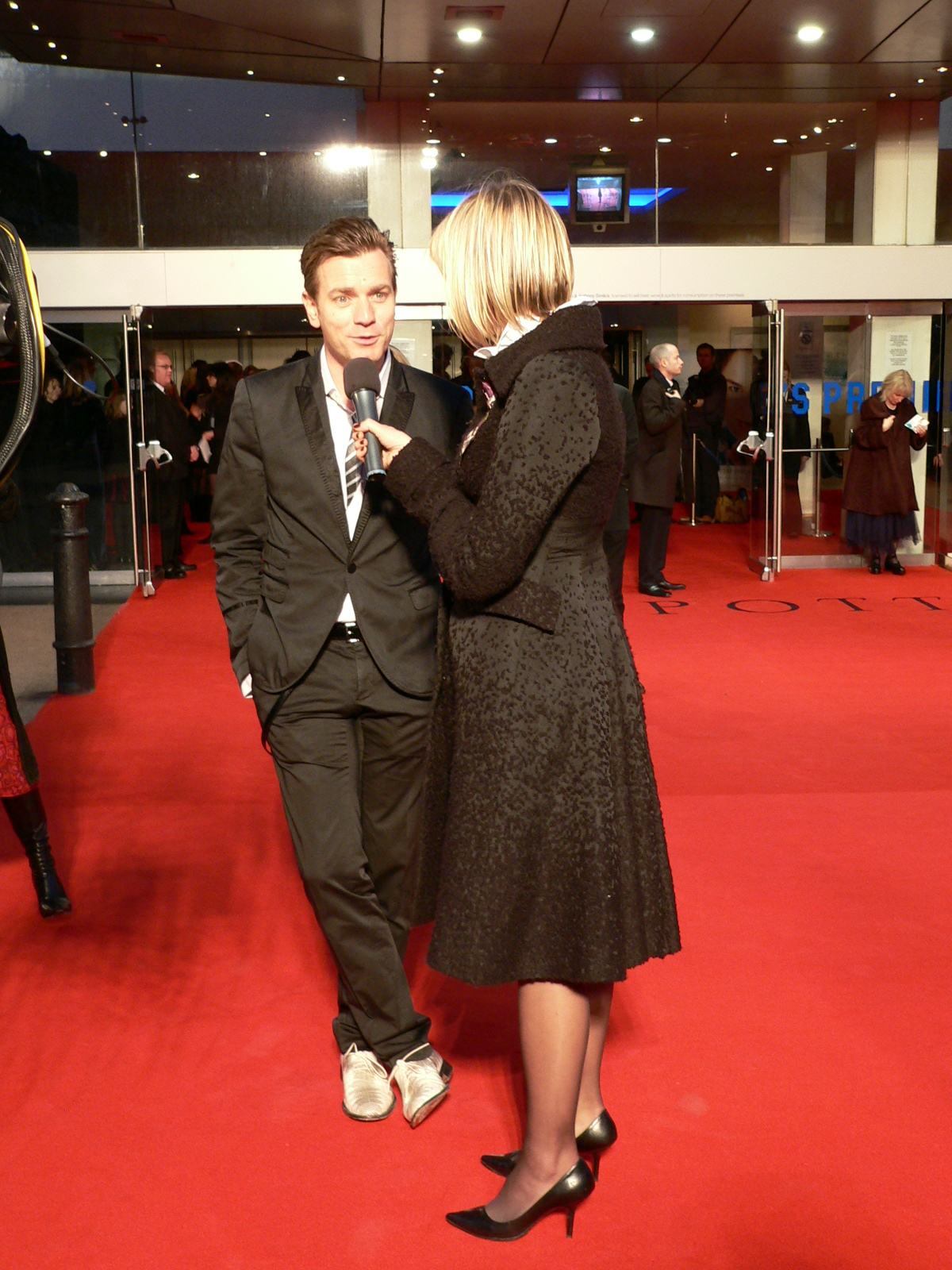 Ewan McGregor